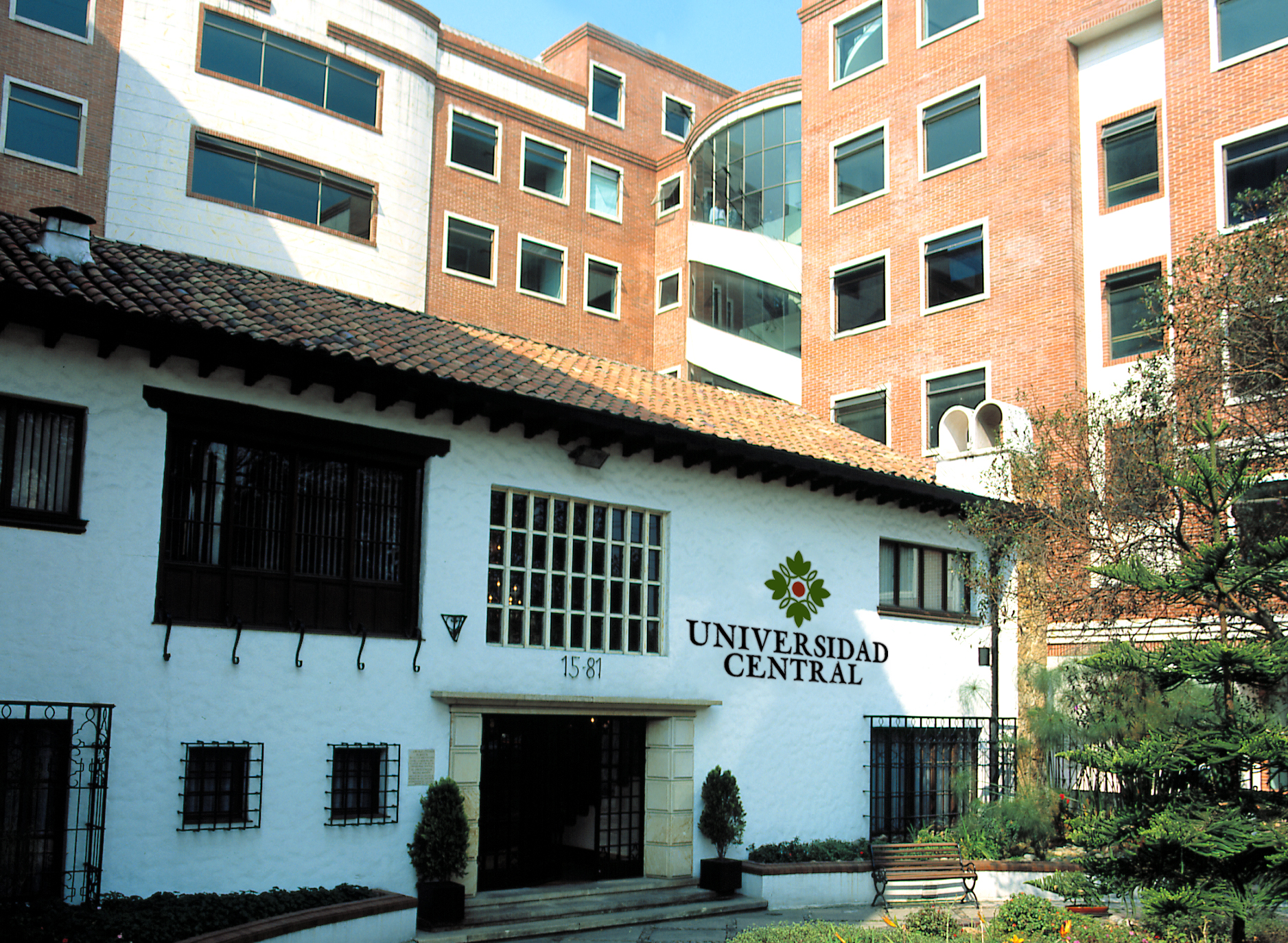 Sede norte de la Universidad Central